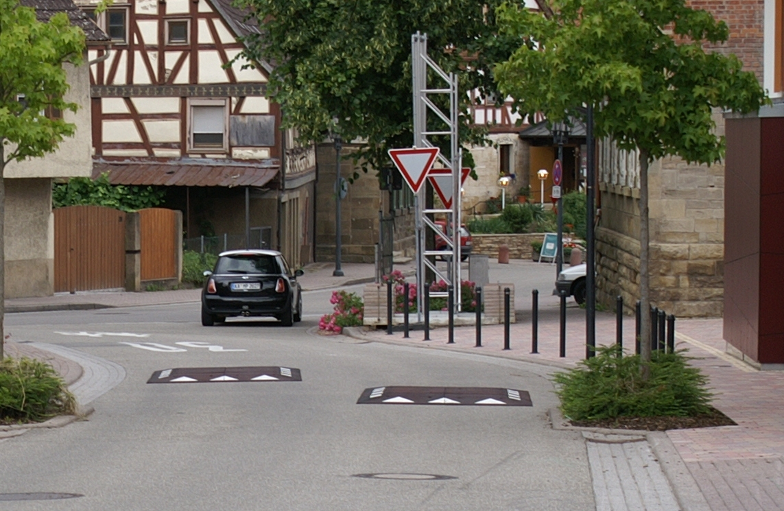 Kombinierte Maßnahmen zur Verkehrsberuhigung in Oberderdingen im Kraichgau: Tempo-30-Zone, Straßenverengung und Berliner Kissen auf der Fahrbahn